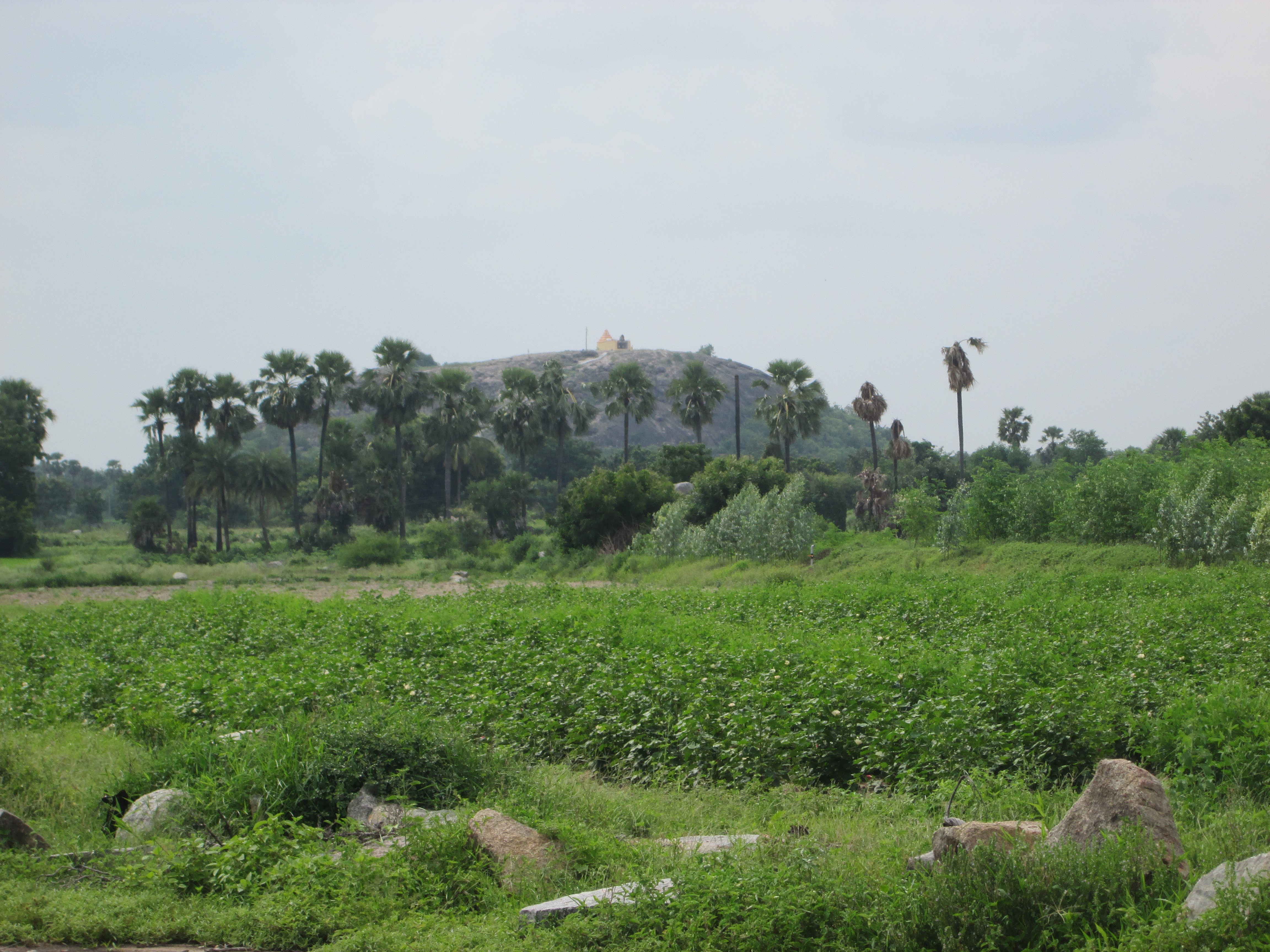 ముశిపట్ల పొలాలు